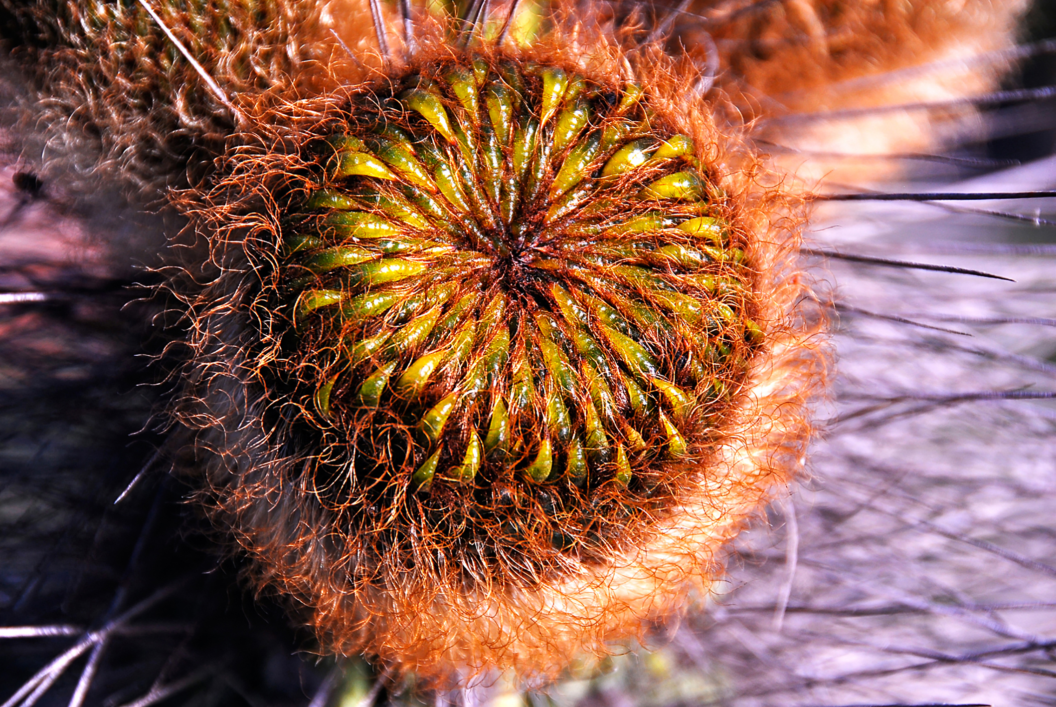 chilenische Pflanze